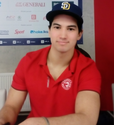 Po zakončení sezóny 2016/17 na autogramiádě ve Werk Areně